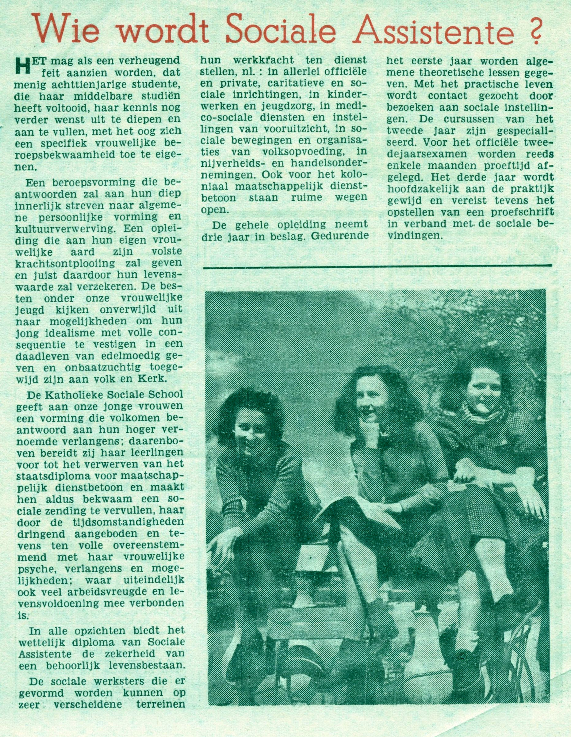 Een campagne in de pers moet meer studentes sociaal werk naar Kortrijk trekken.